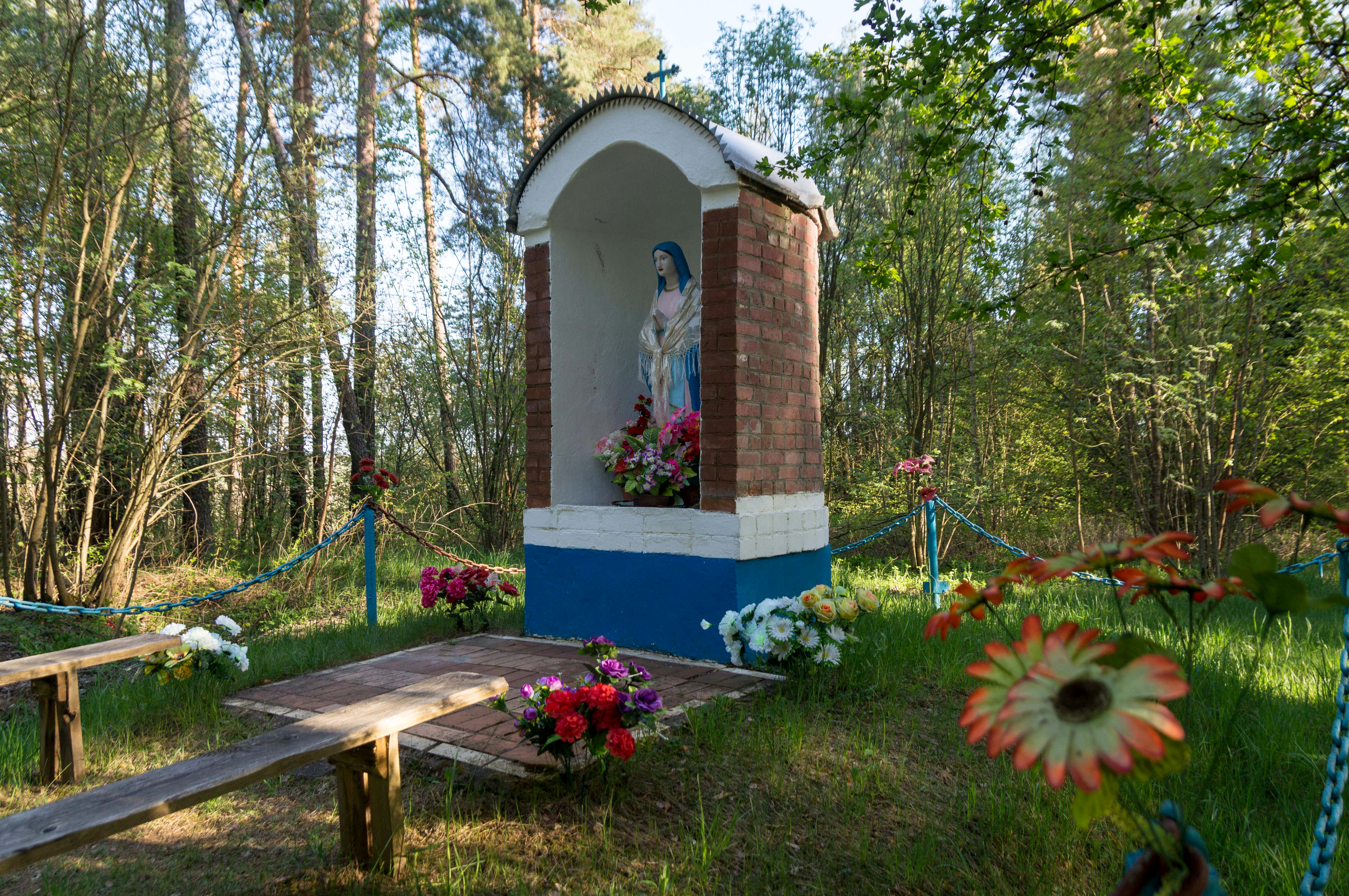 Капліца ў Мацькаўцах адбудавана на месцы колішняй у 1998 г.